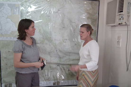 Christine Buchholz und Niema Movassat trafen sich in Juba mit Lise Grande (rechts im Bild), Koordinatorin von UN OCHA (Büro für die Koordination humanitärer Angelegenheiten der Vereinten Nationen) im Südsudan. Sie ging auf die negative Rolle der südsudanesischen Armee, der SPLA im Südsudan ein, die für diverse Menschenrechtsverletzungen verantwortlich sei. Auch werden nach ihrer Einschätzung nach der erfolgten Abspaltung diverse Stammeskonflikte um Land, Wasser und Vieh im Süden wieder aufflammen, da dann die einigende Klammer der Spaltung vom Norden wegfalle. Die humanitäre Situation stellt sich im Süden als dramatisch dar. Im Frühjahr waren 2,5 Millionen Südsudanesen nach einer Missernte von Nahrungsmittelhilfen der Vereinten Nationen abhängig, die schlechte Infrastruktur erschwert die Versorgung erheblich. Die große humanitäre Herausforderung im Südsudan wird deutlich, wenn man sich vergegenwärtigt, dass es für ein 15 jähriges Mädchen hier wahrscheinlicher ist bei der Geburt ihres Kindes zu sterben als die Schule abzuschließen. Foto: DIE LINKE